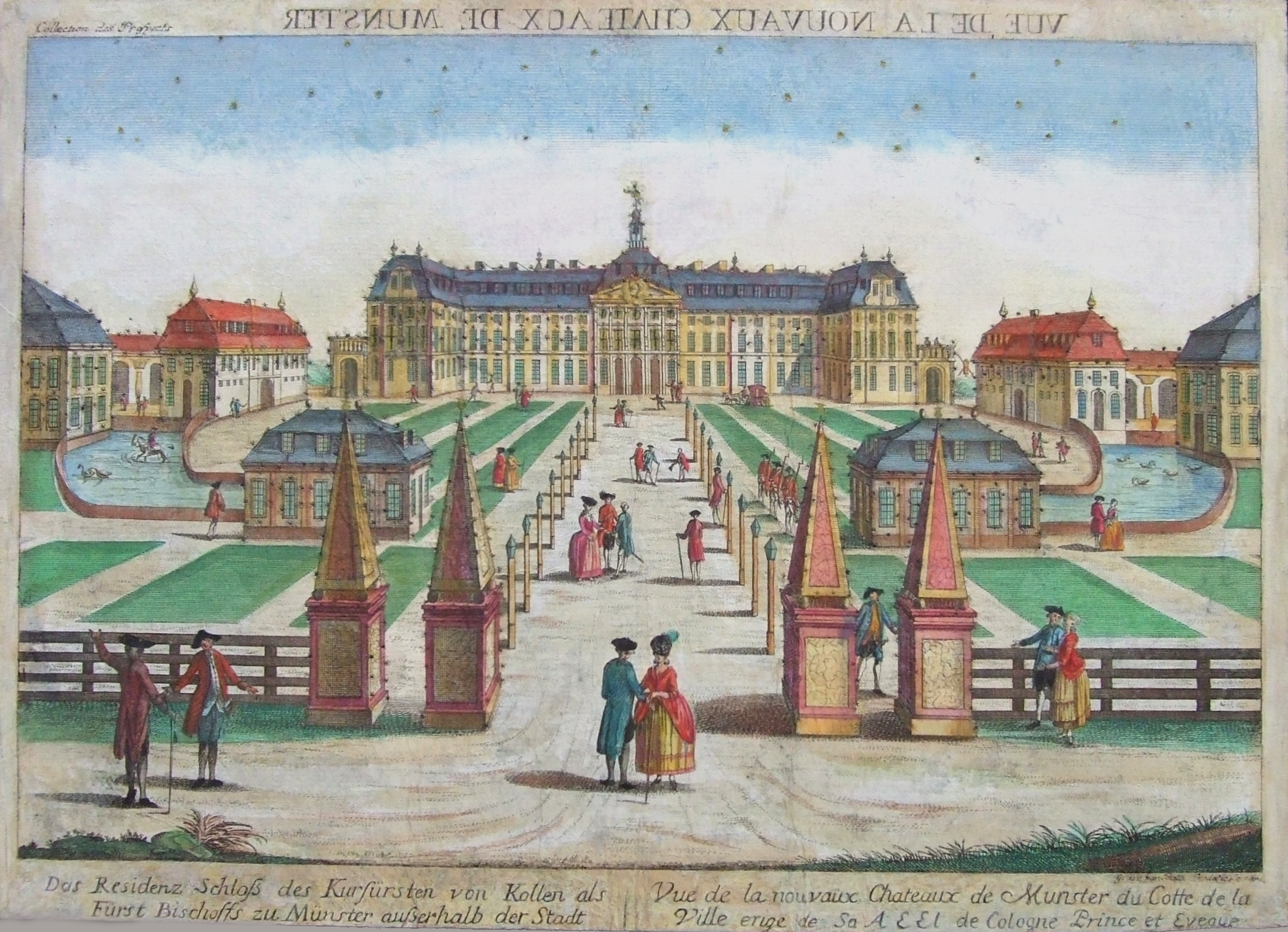 Residenzschloss in Münster/Westfalen; Guckkastenbild Augsburg um 1780; Bild: 40,2 cm x 28,5 cm